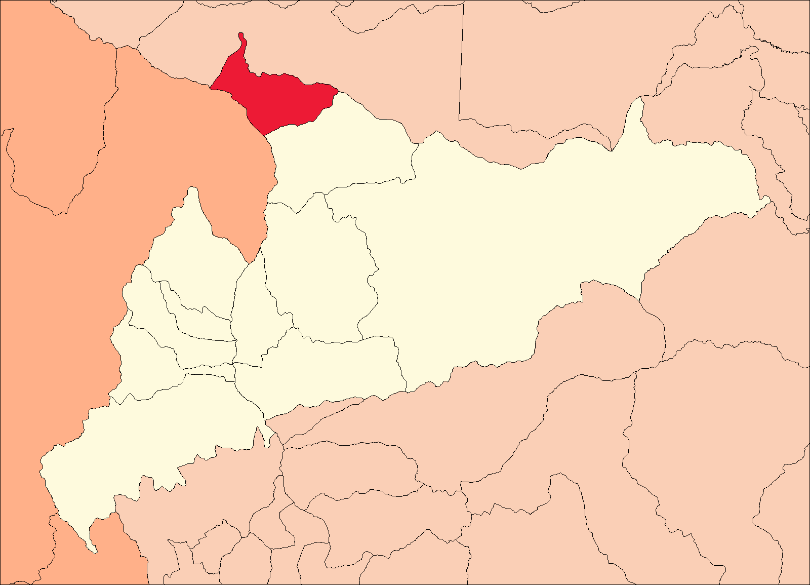 Ubicación del distrito de Arancay.